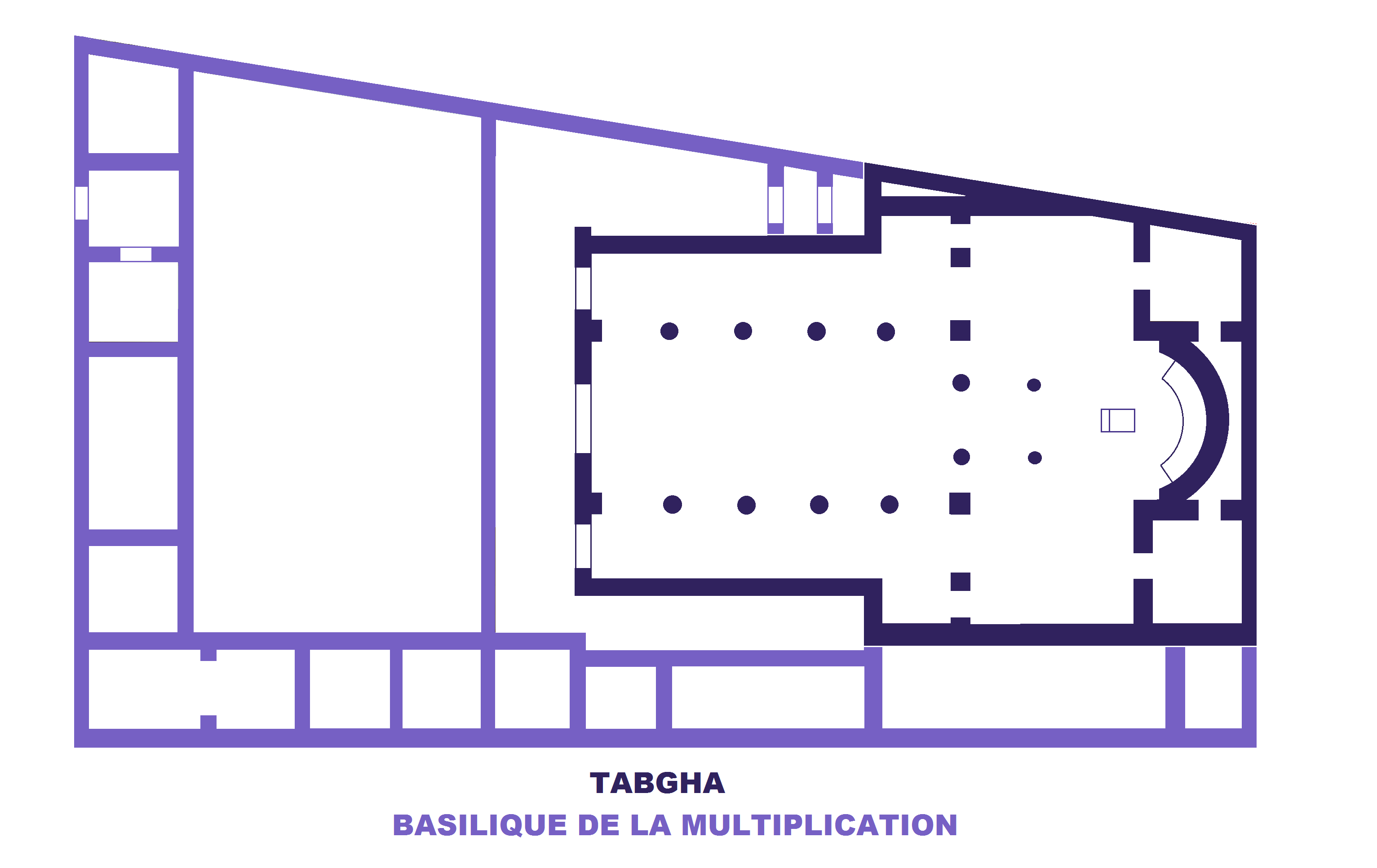 Tabgha, Plan de la basilique de la Multiplication